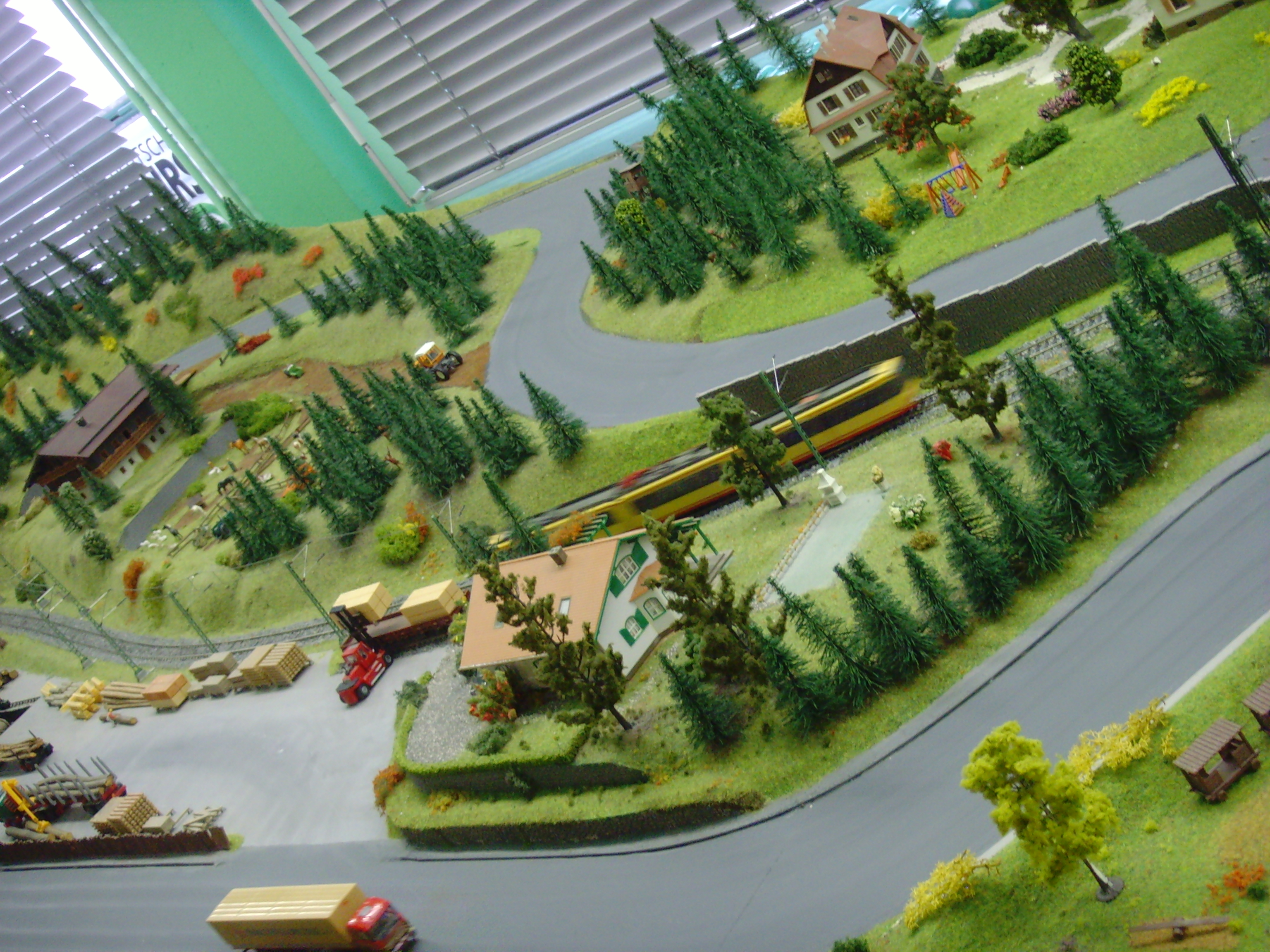 Verkehrsmuseum Karlsruhe 14 Faller Car System